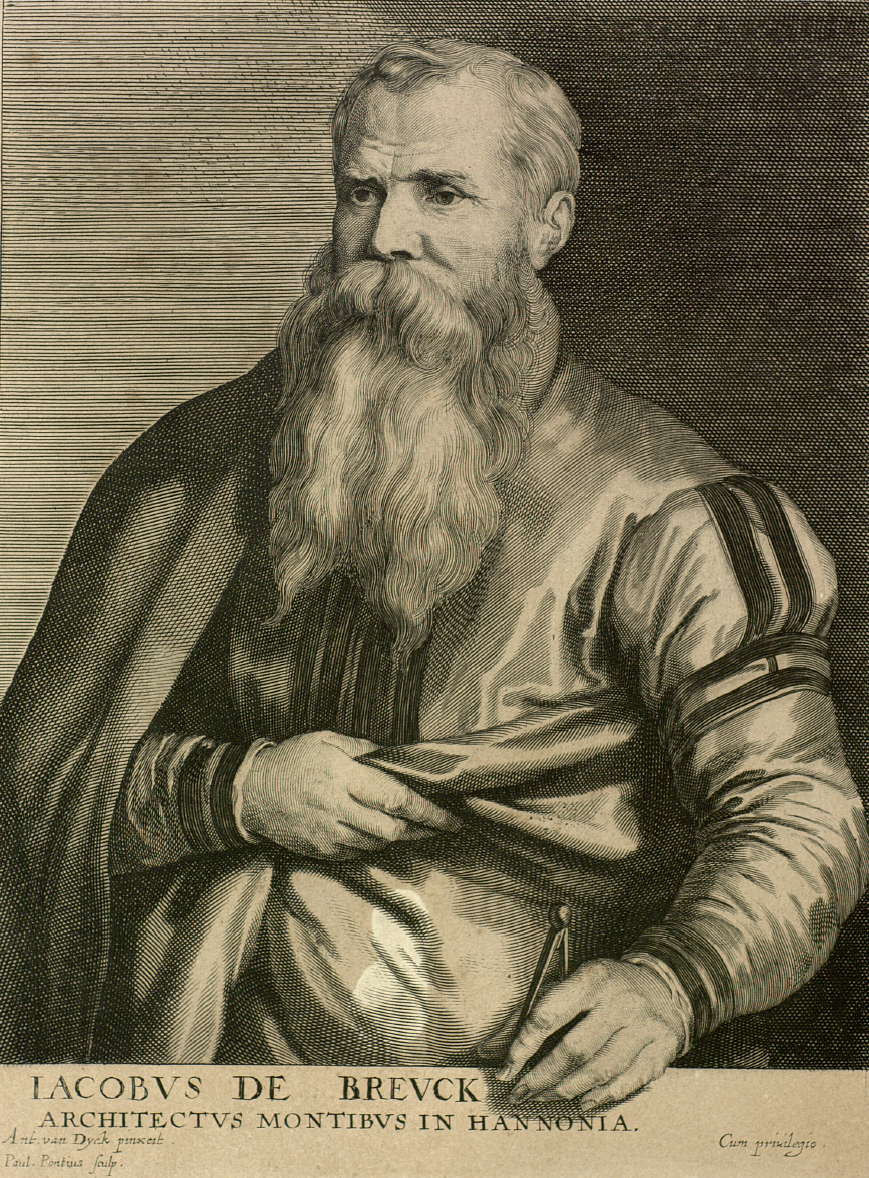 Depicted person: Jacques du Broeucq – architect, sculptor